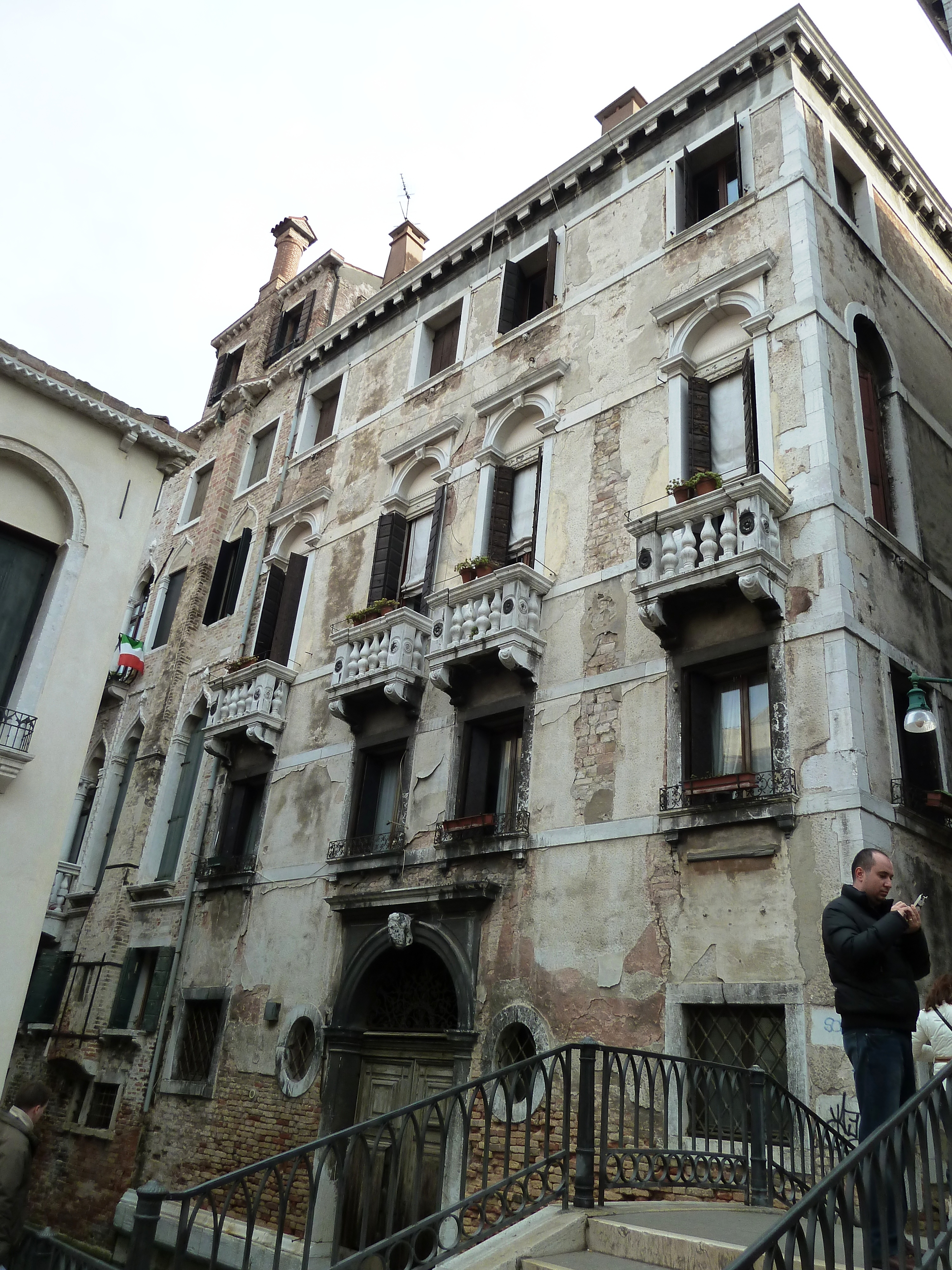 Palazzo Gozzi (Venice)